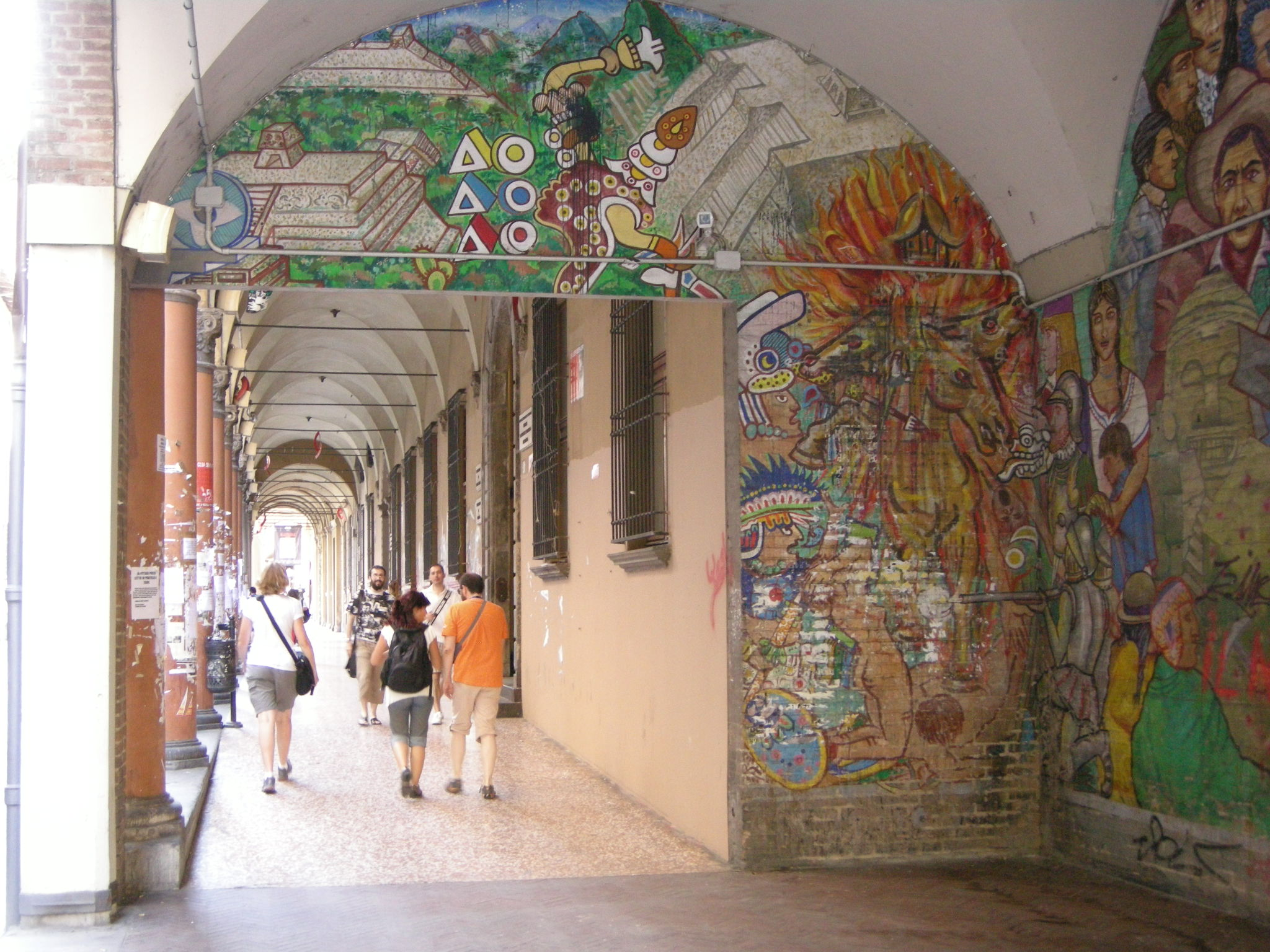 Bologna, graffiti sotto i portici via zamboni